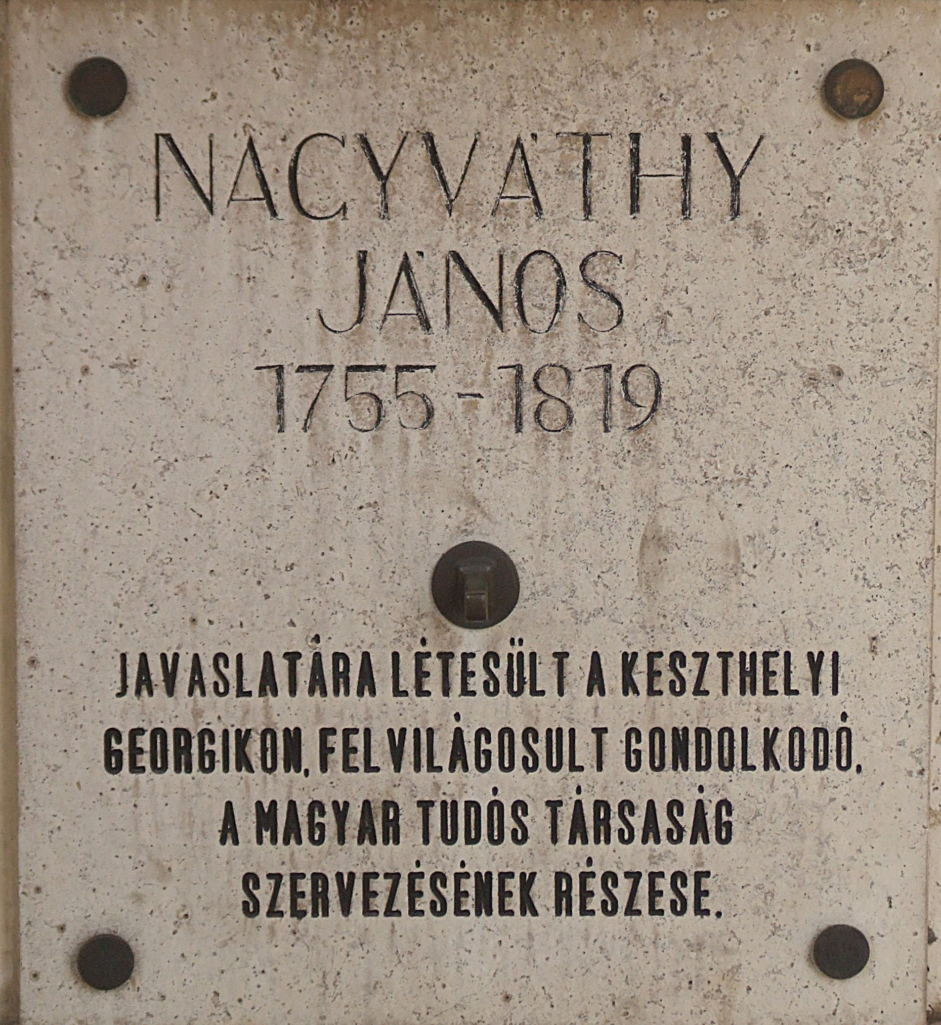 Nagyváthy János emléktáblája, Budapest, V. kerület, Kossuth tér 11.